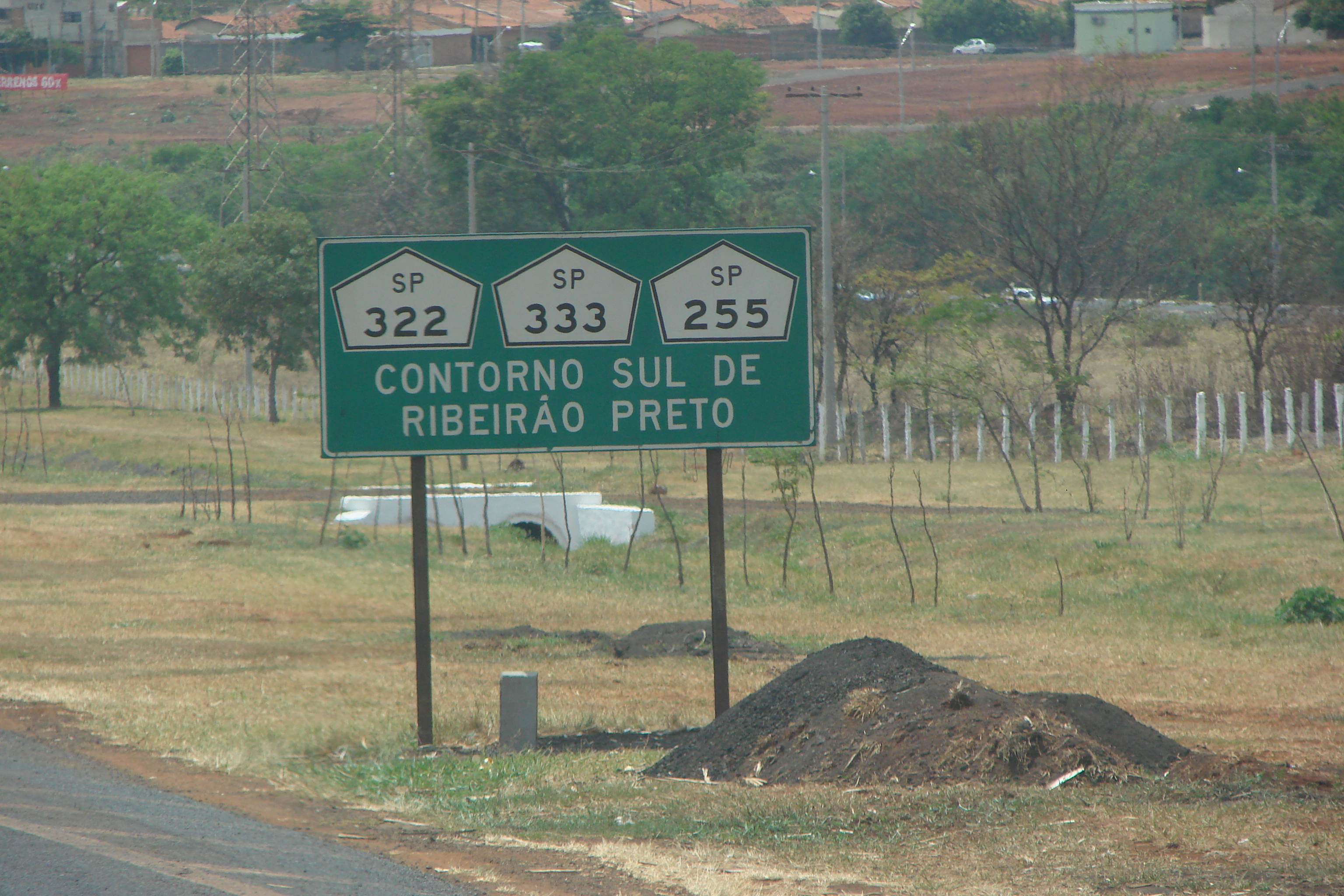 Placa Rodoviária Controno Sul SP-255